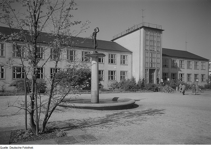 Original image description from the Deutsche FotothekDresden. Technische Universität, Institut für Schwachstromtechnik (Barkhausen-Bau) mit Brunnen